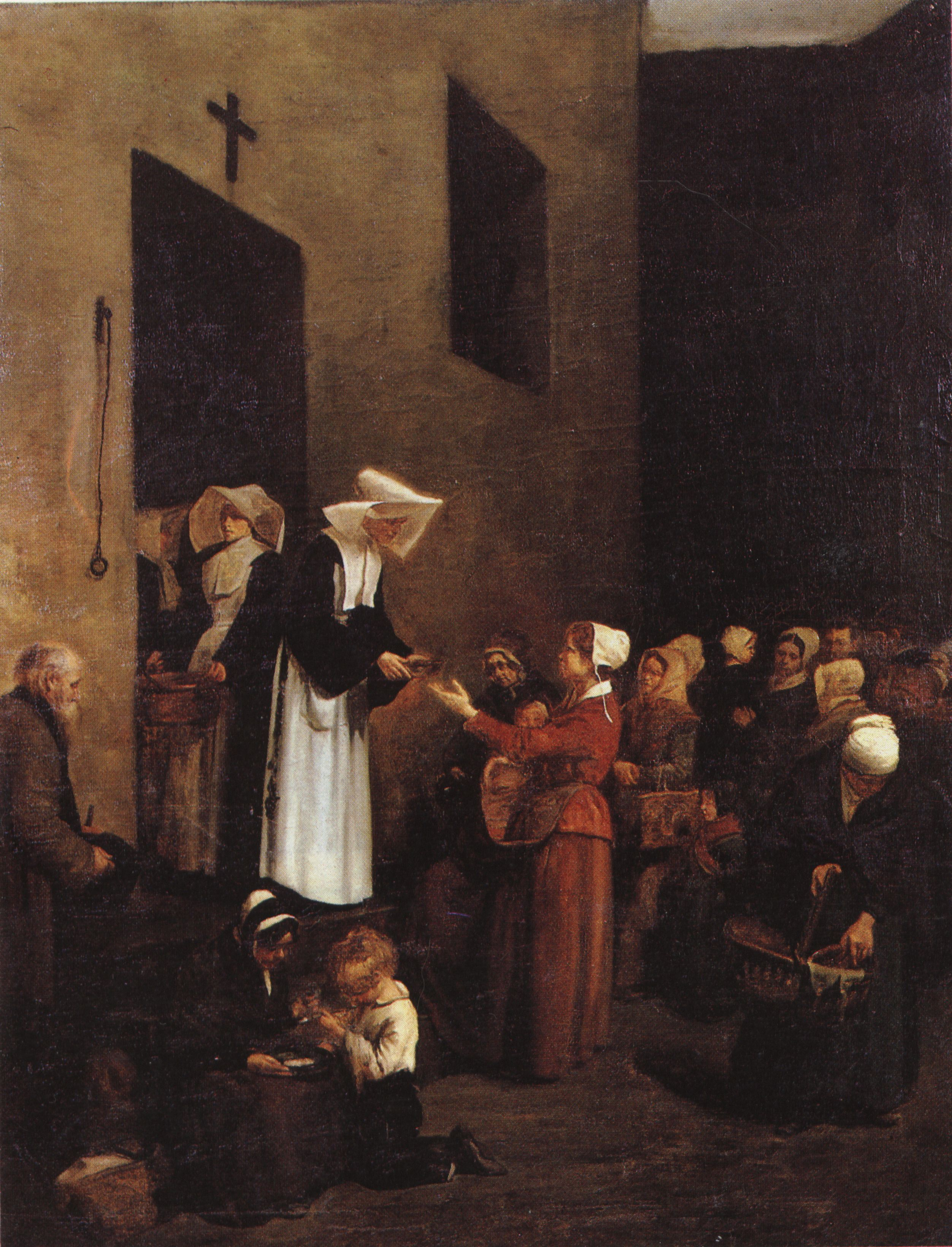 La Charité